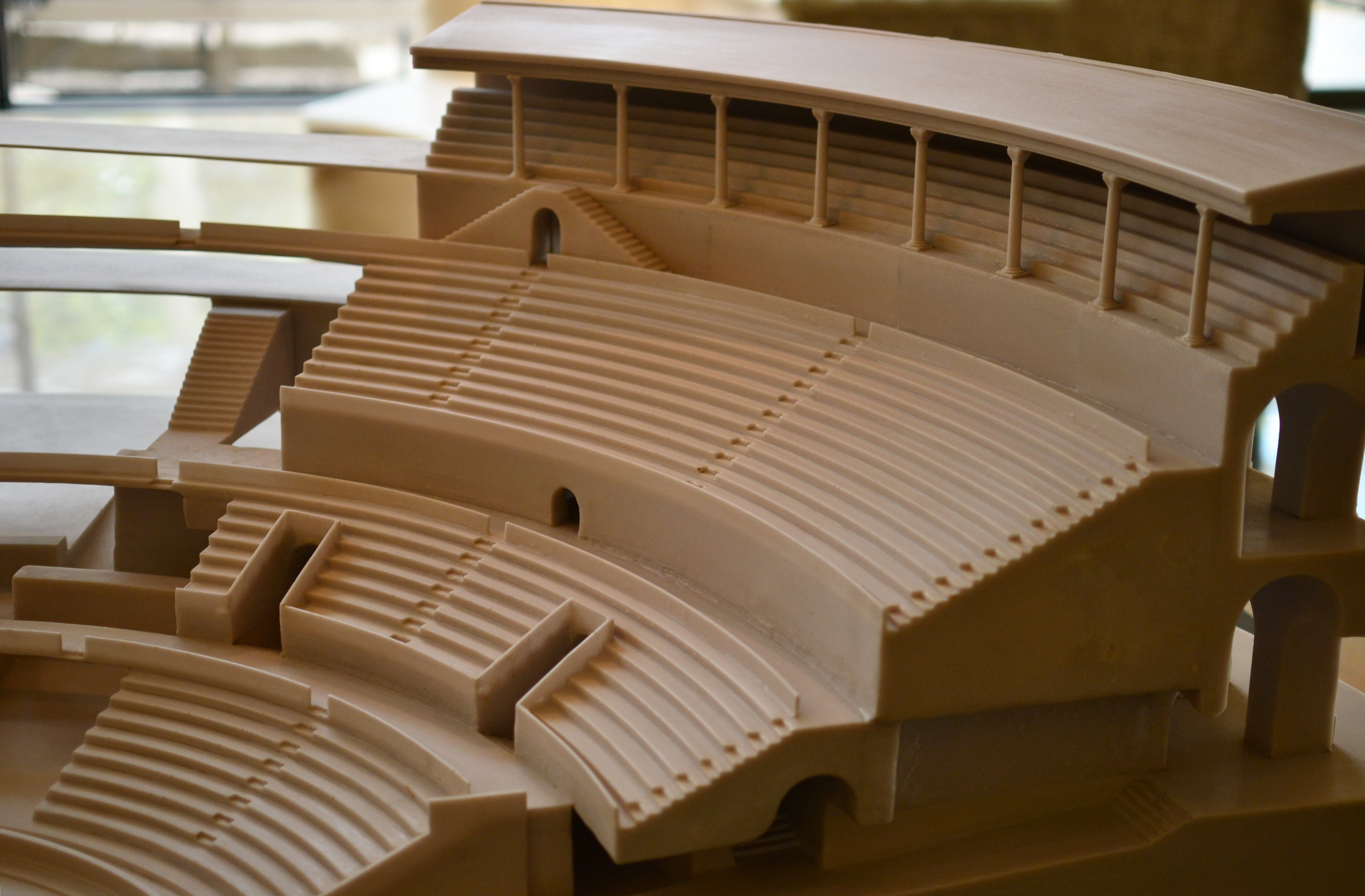 Maqueta del teatro de Caesaraugusta en el museo del Teatro Romano de Caesaraugusta.